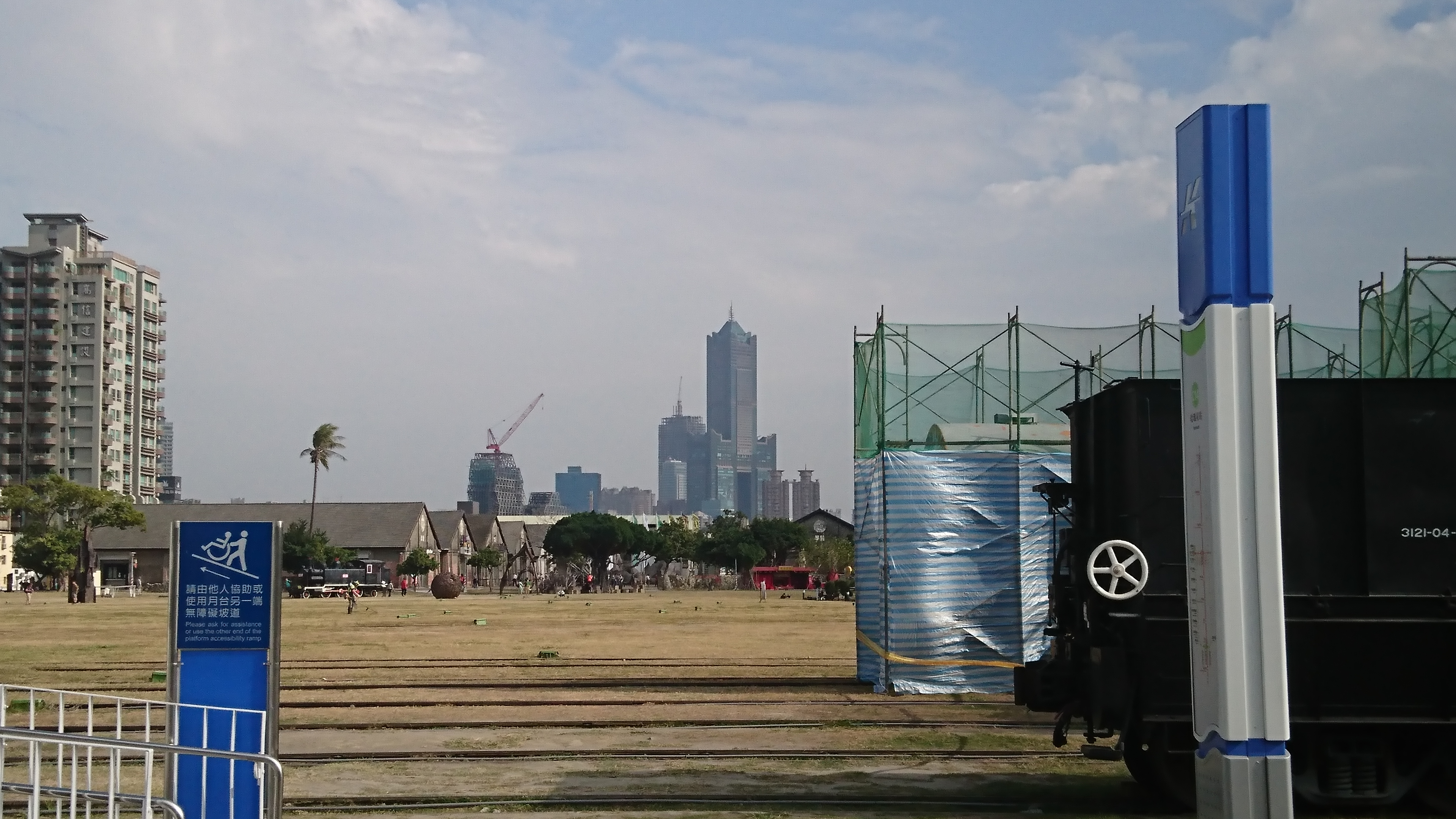 從西子灣站與哈瑪星站旁的哈瑪星鐵道園區，觀賞遠處高雄地標85大樓。